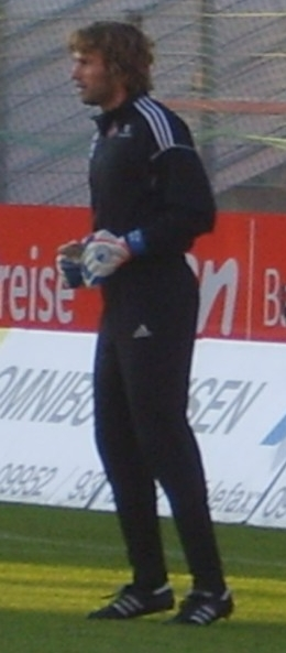 Stefan Wessels, 1. FC Köln